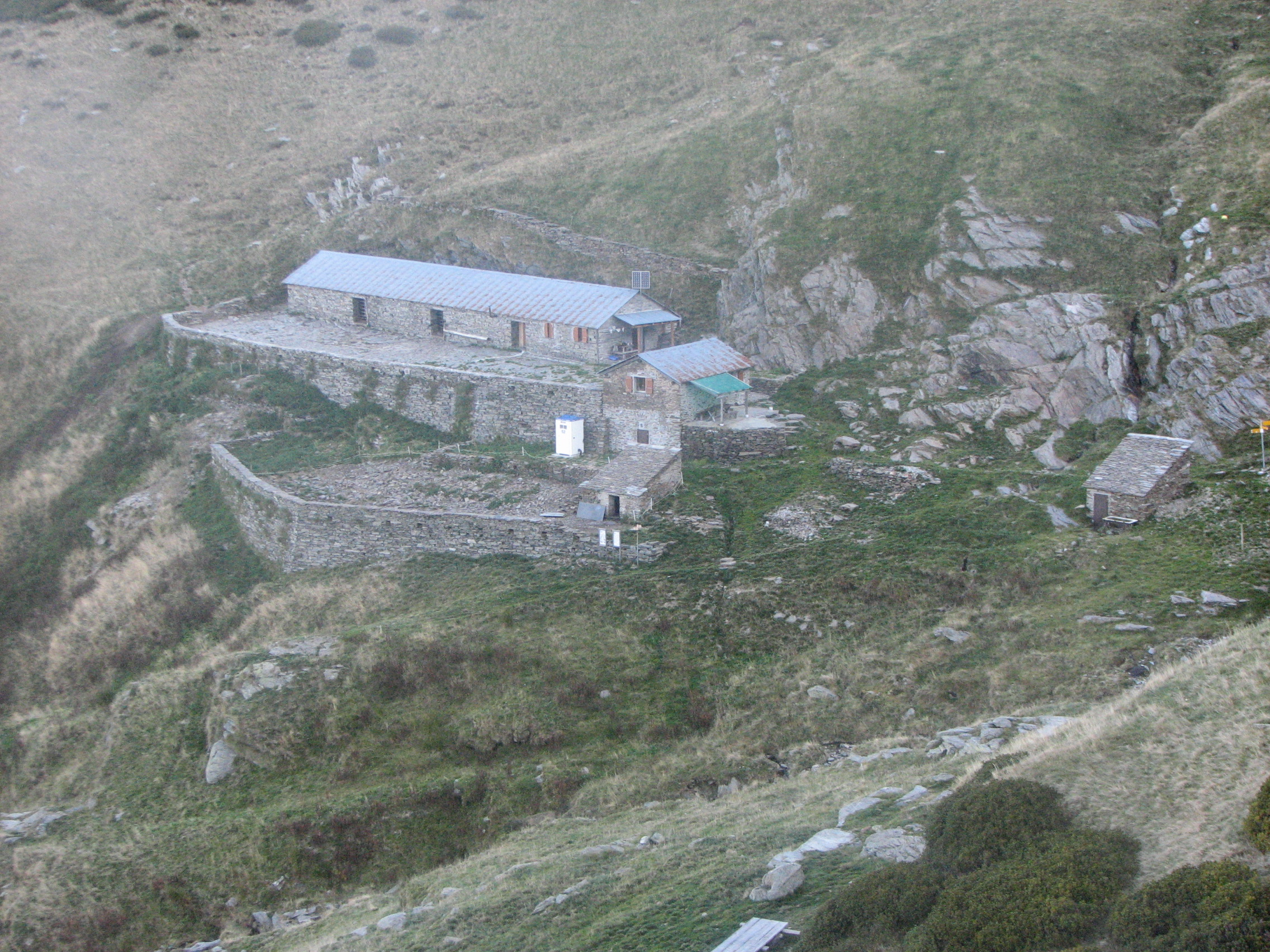 Alpe di Montoia